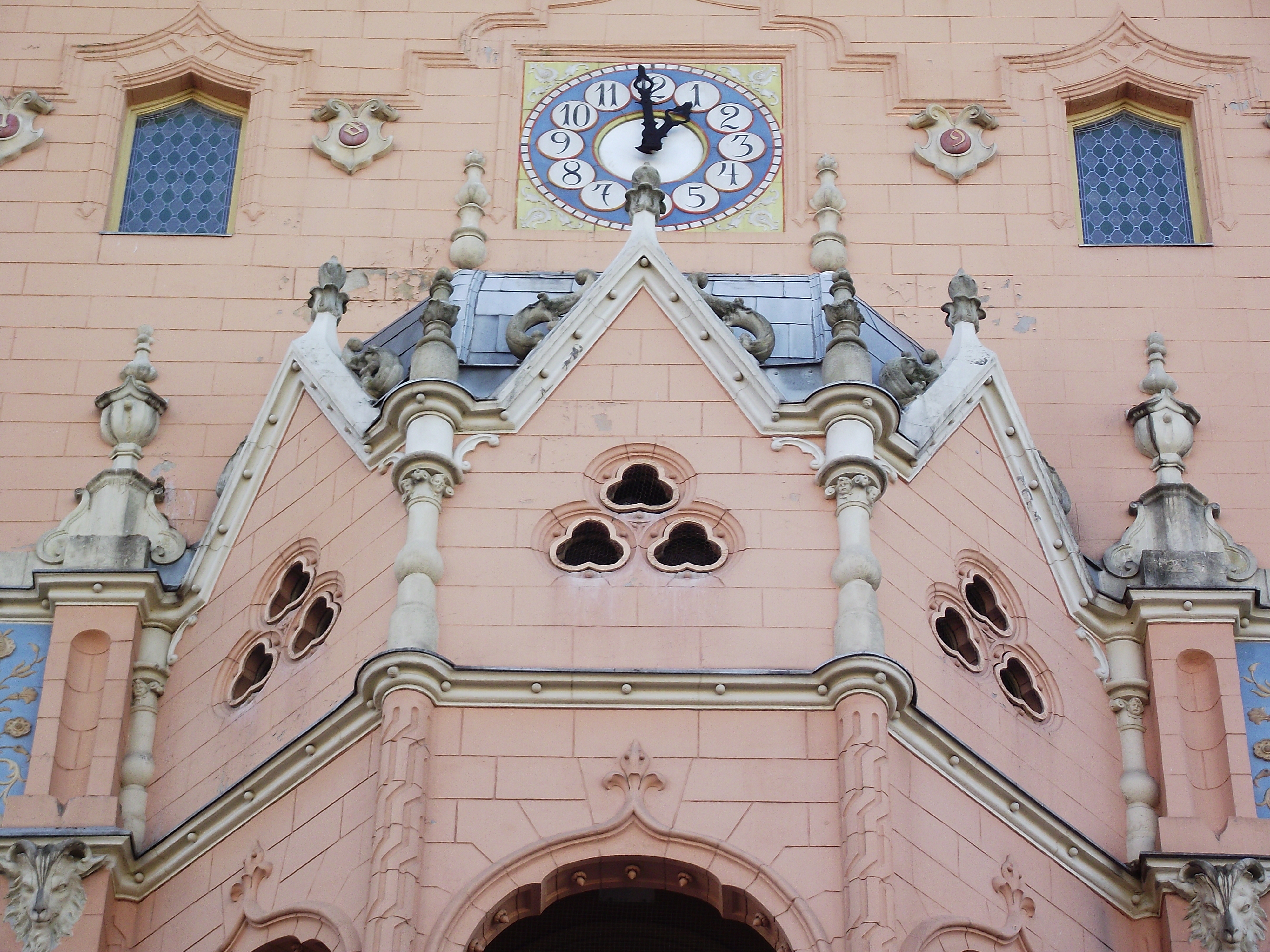 Kecskeméti Városháza ornamentika